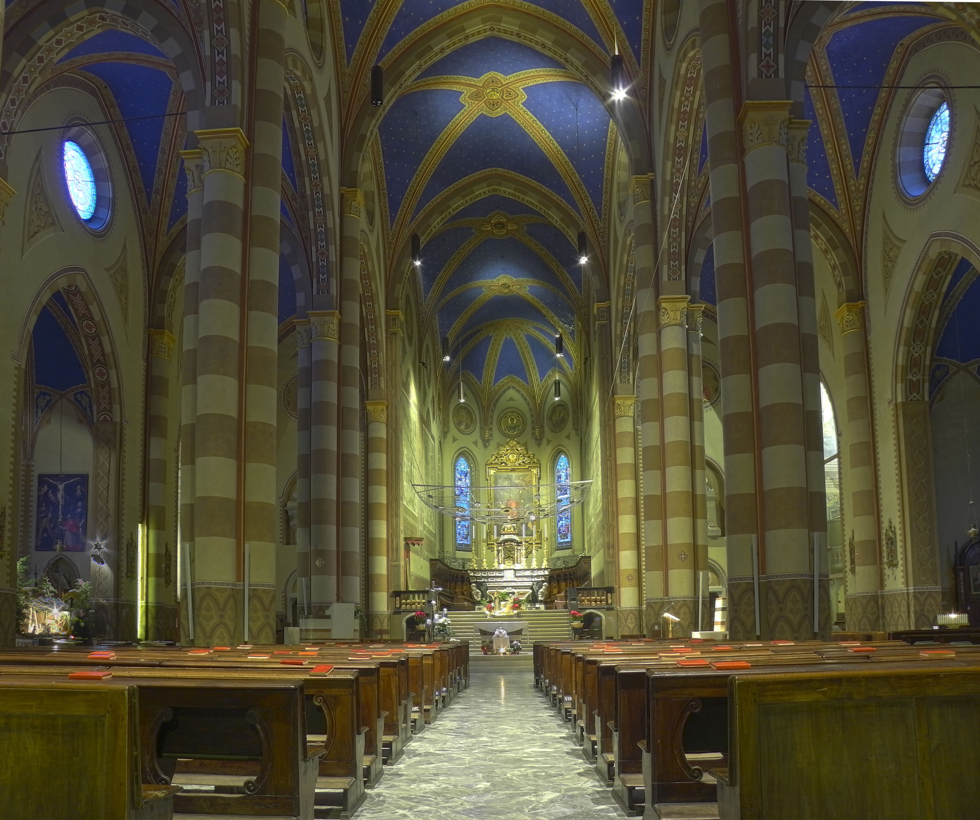 N) Italia